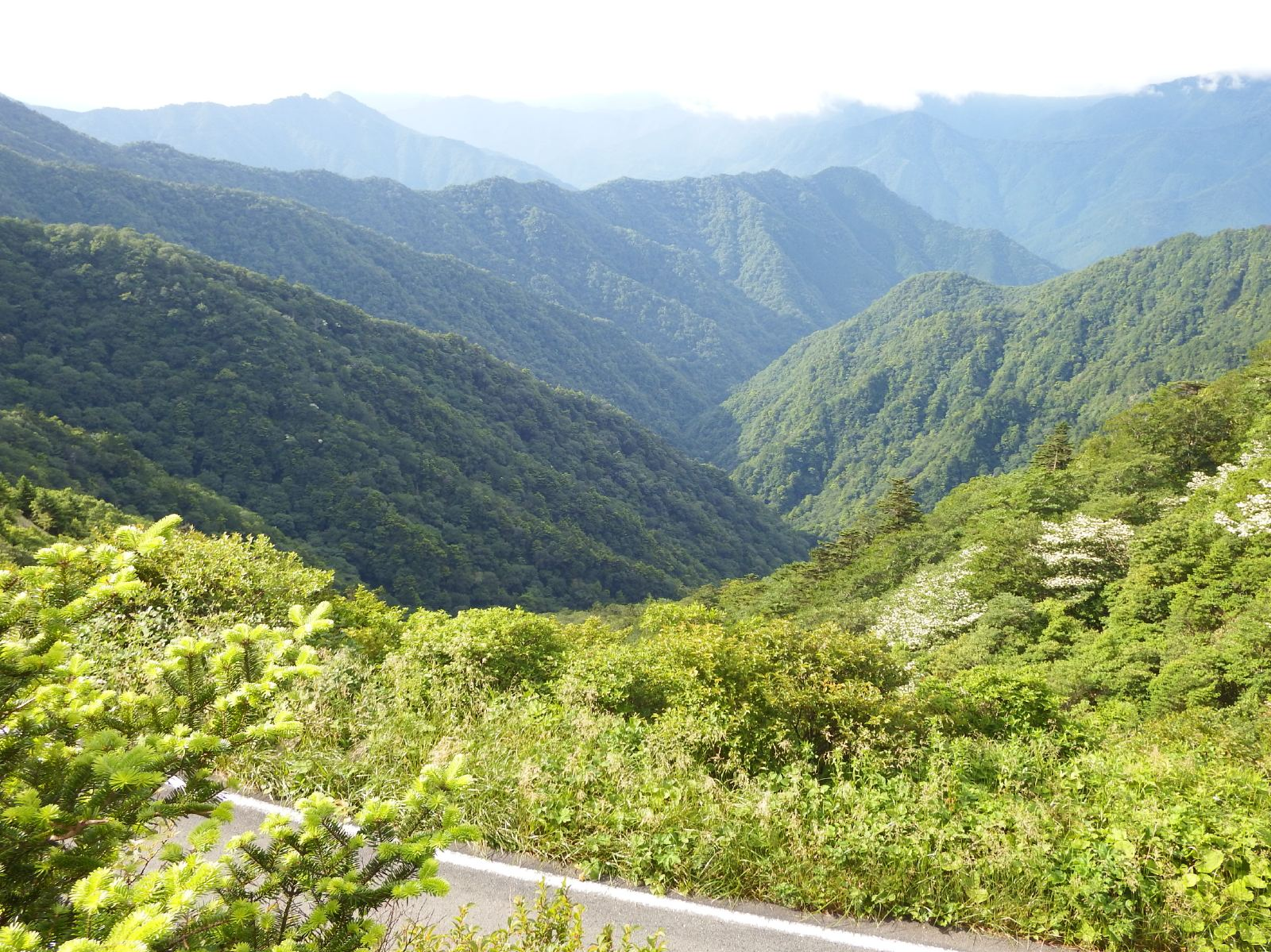 吉野川源流の碑から見る